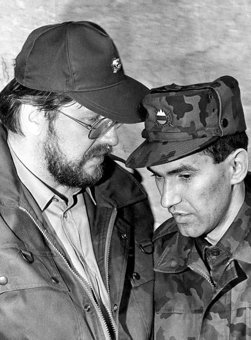 Igor Bavčar in Janez Janša v času desetdnevne vojne